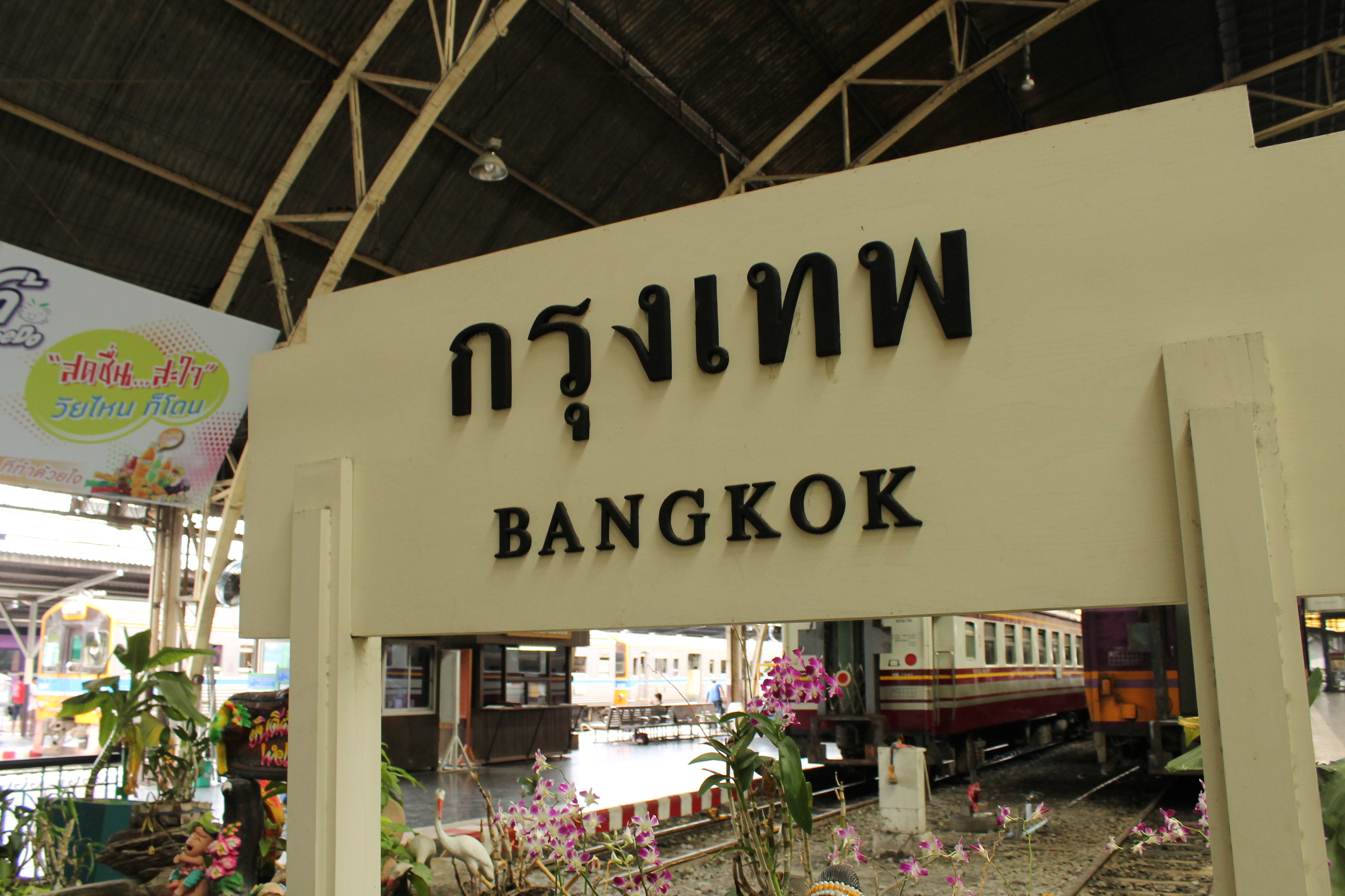 สถานีรถไฟหัวลำโพง